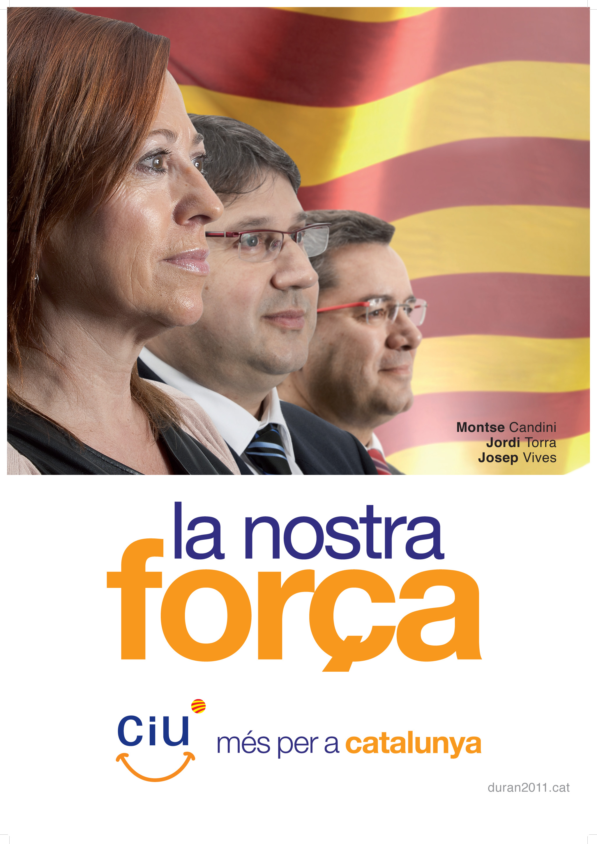 Cartell Barcelona - Senat